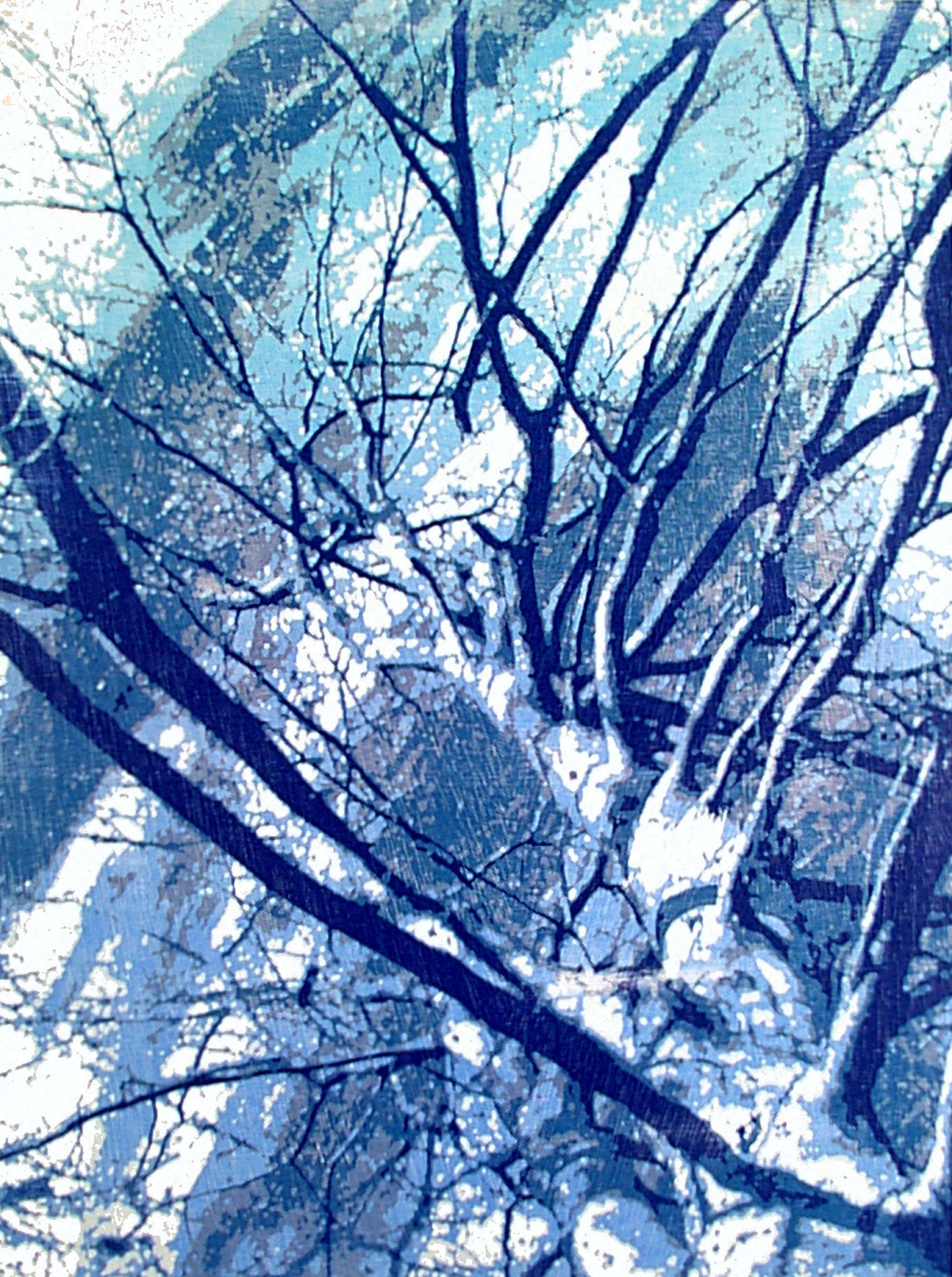 Der Erleuchtete, Holzschnitt von Joachim Feldmeier, 2007, Auflage 5, Papierformat 106 x 78 cm, Plattenformat 77,8 x 57,8 cm, Hahnemühle Alt Dresden 300 g, Drucker Feldmeier